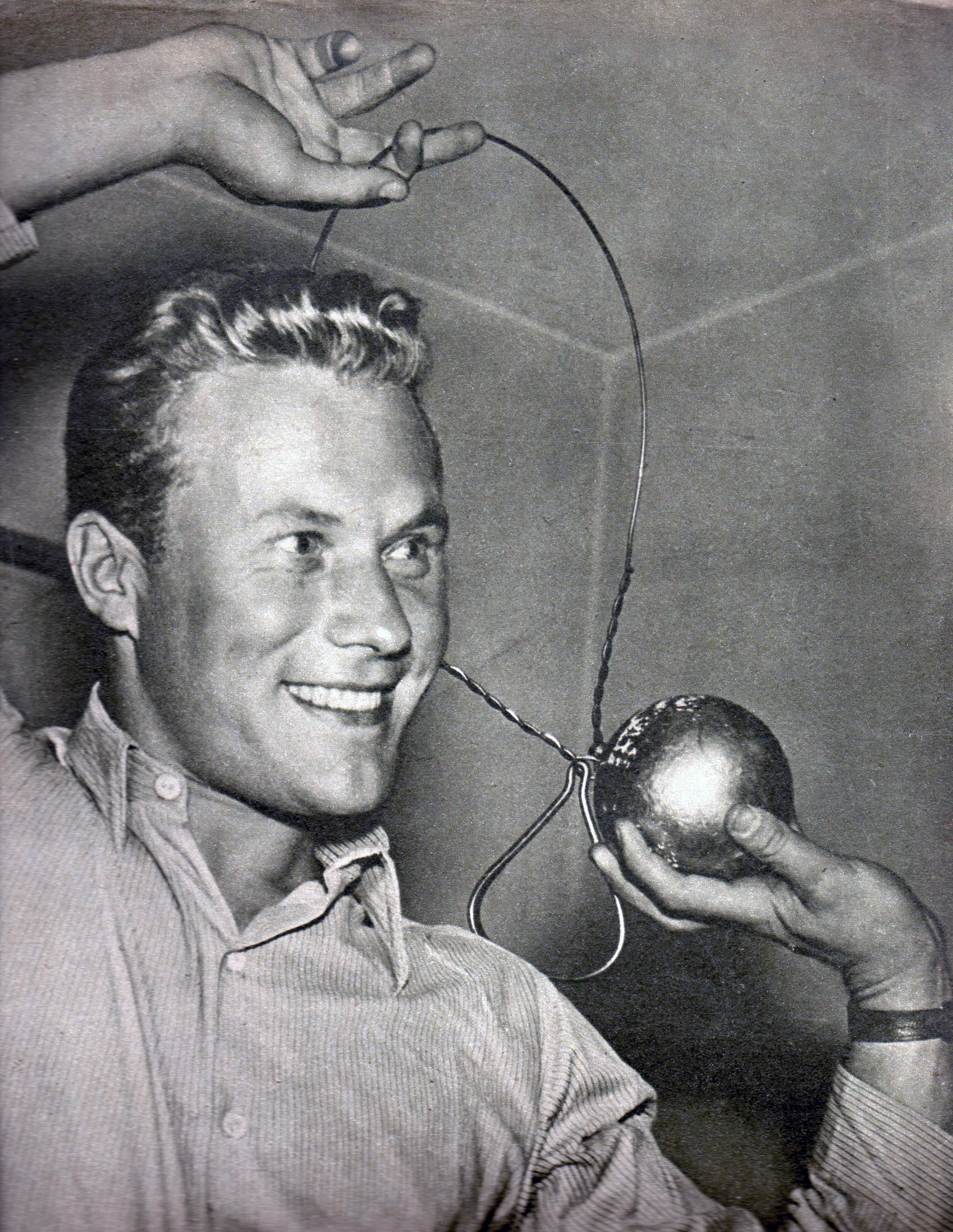 T. Rut